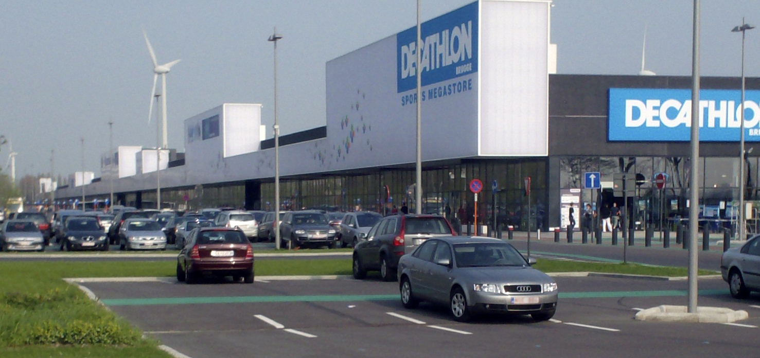 Het winkelcentrum B-Park in Brugge